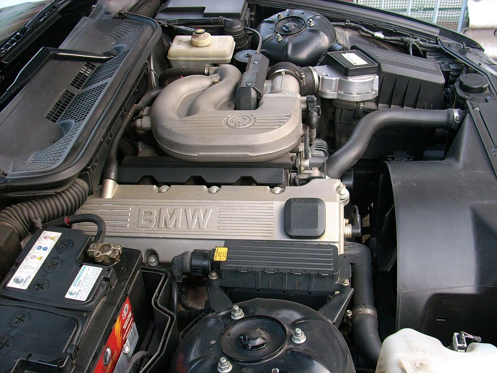 vista laterale sx del vano motore di un BMW E36 316 Coupe del 97